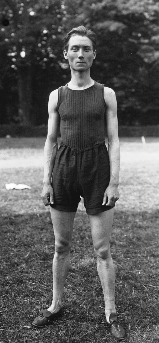 Finale des Jeux Interalliés : Proux : [photographie de presse] / Agence Meurisse